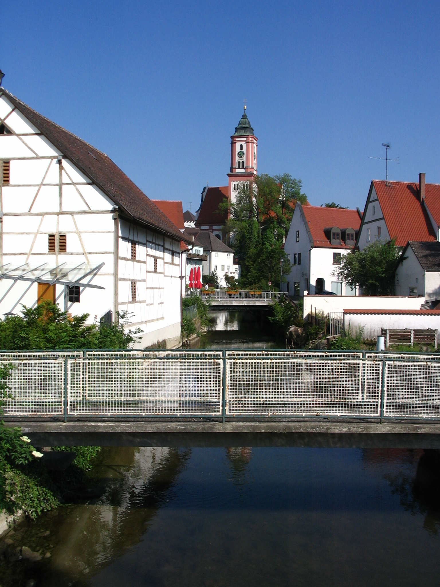 Brücke, Krumbach in Scwaben.